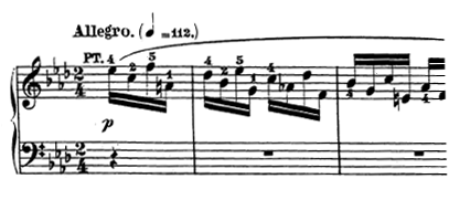 Compassos iniciais do quarto movimento da Sonata Op. 26 de Beethoven